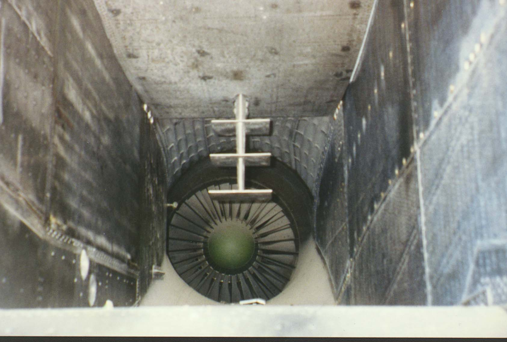 Lufteinlass der MiG-25, 1997 in Monino